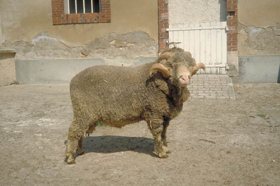 bélier mérinos de Rambouillet